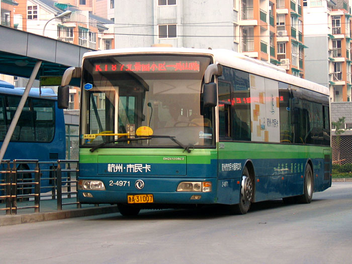 DHZ6120RC